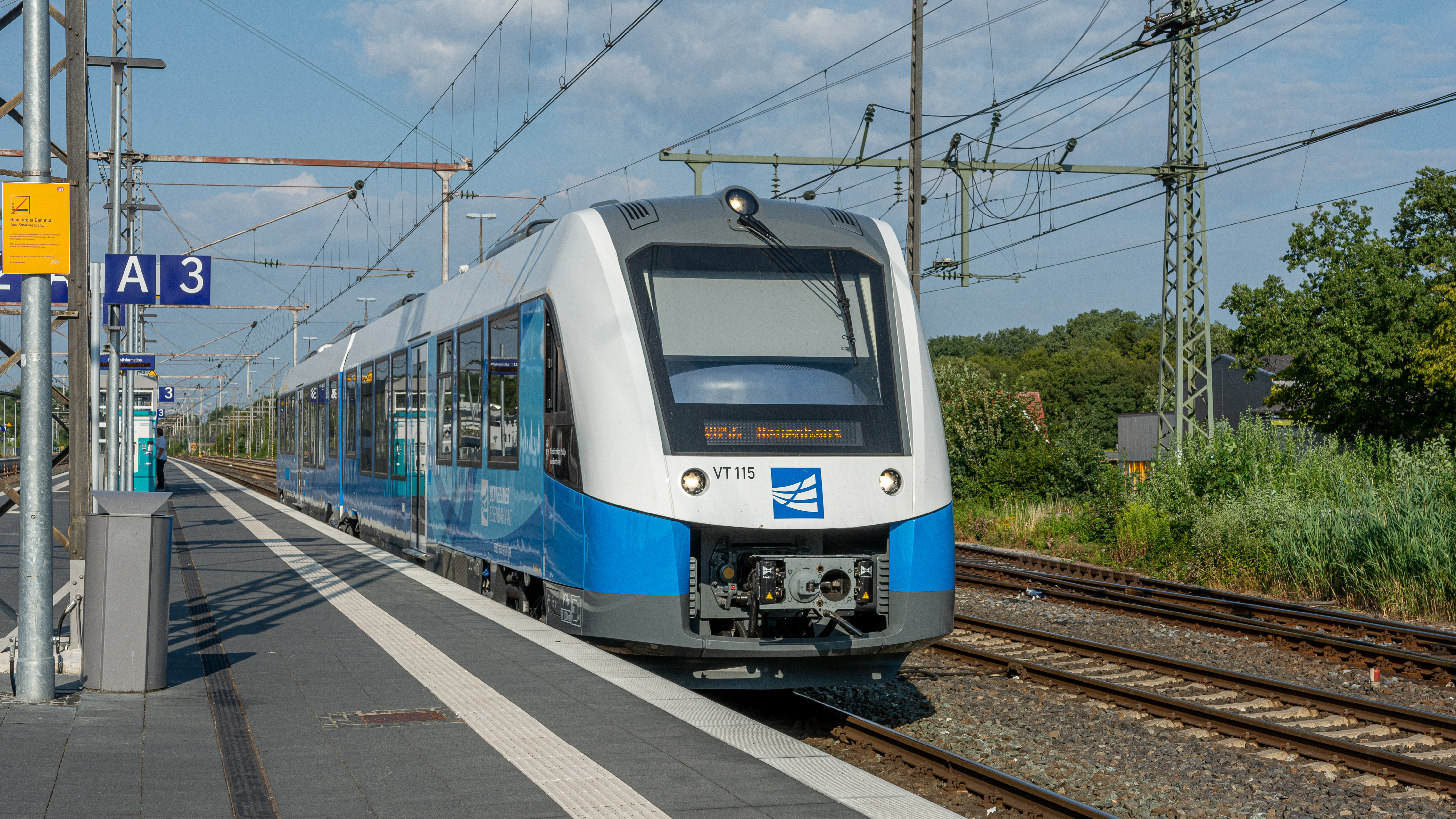 Sinds begin juli 2019 verzorgt de Bentheimer Eisenbahn personenvervoer tussen Bad Bentheim via Nordhorn en Neuenhaus. Coradia Lint BE VT115 staat op het station Bad Bentheim klaar voor vertrek, als RB56 naar Neuenhausen.